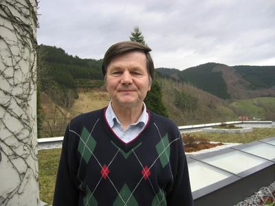 Foto di Matti Jutila